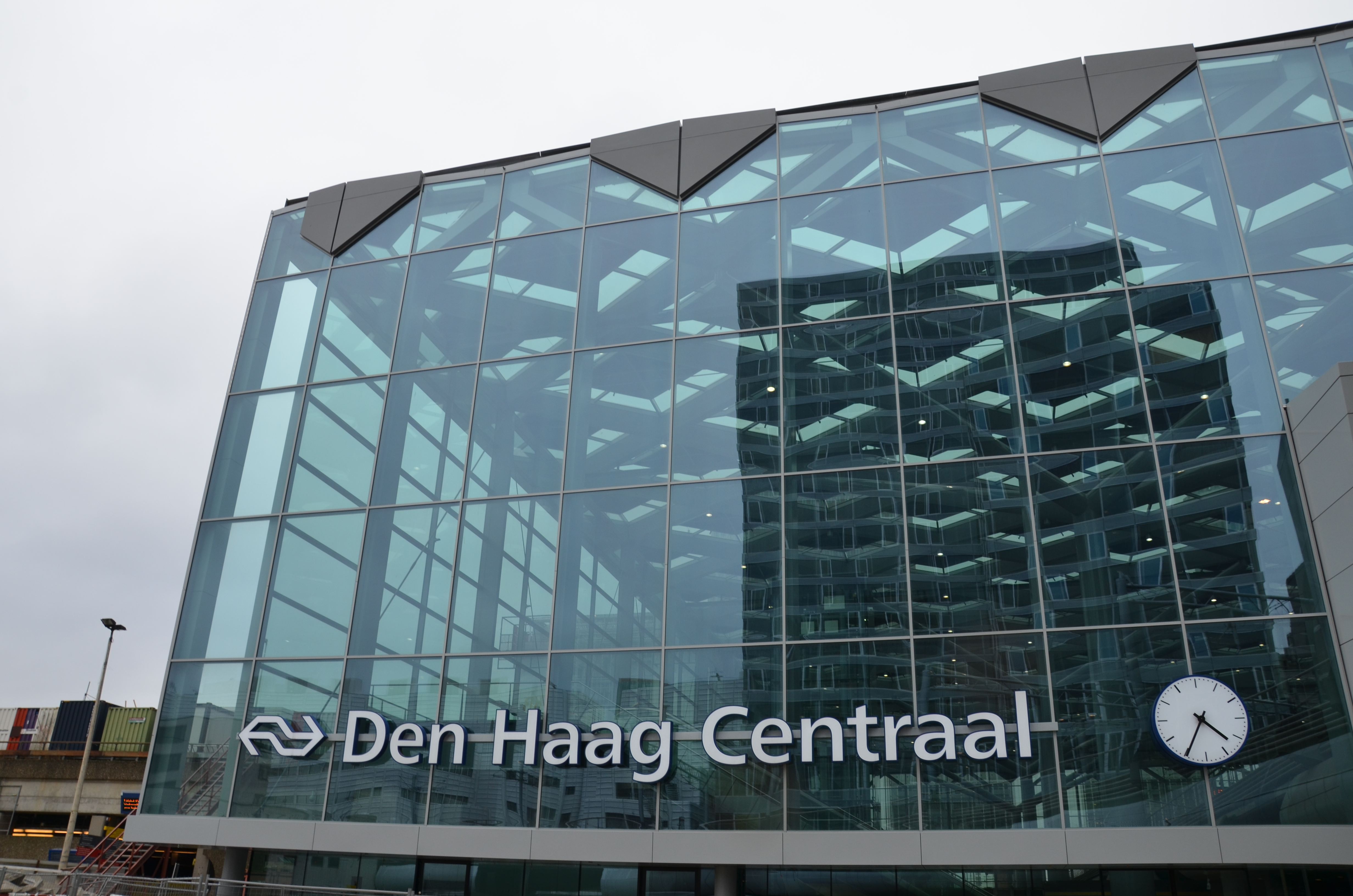 Het nieuwe Centraal Station van Den Haag anno 2014.